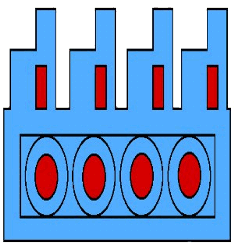 Glifo de Tenango de Doria, Hidalgo